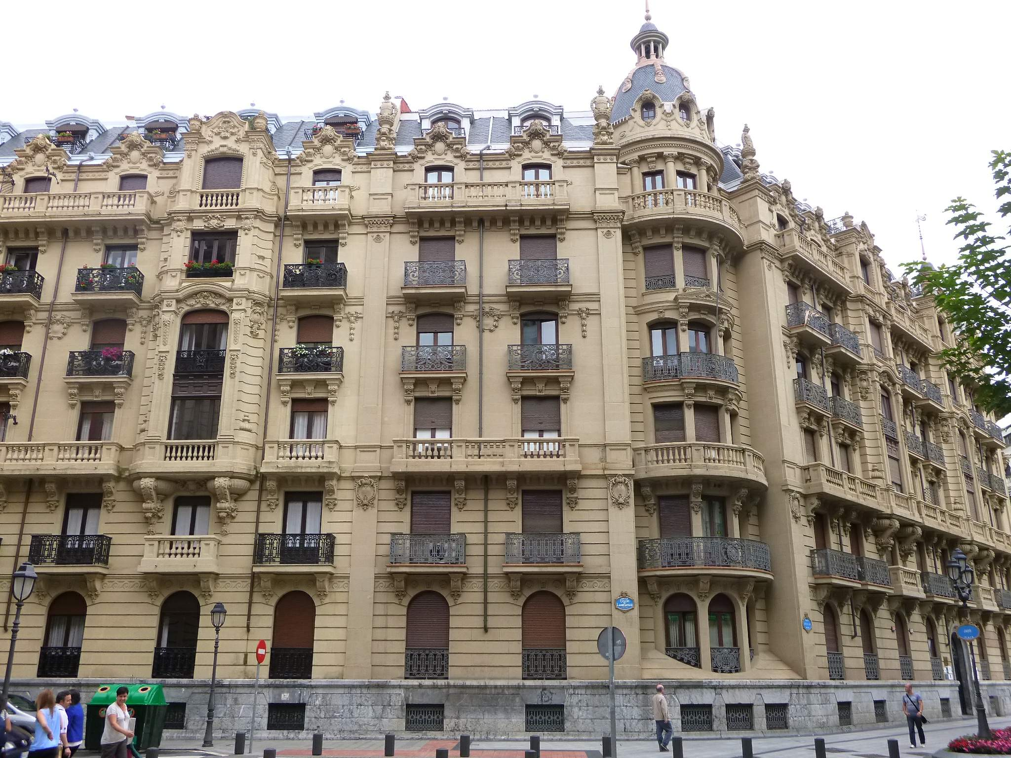 Calle Ercilla esquina calle Colón de Larreátegui (Bilbao)